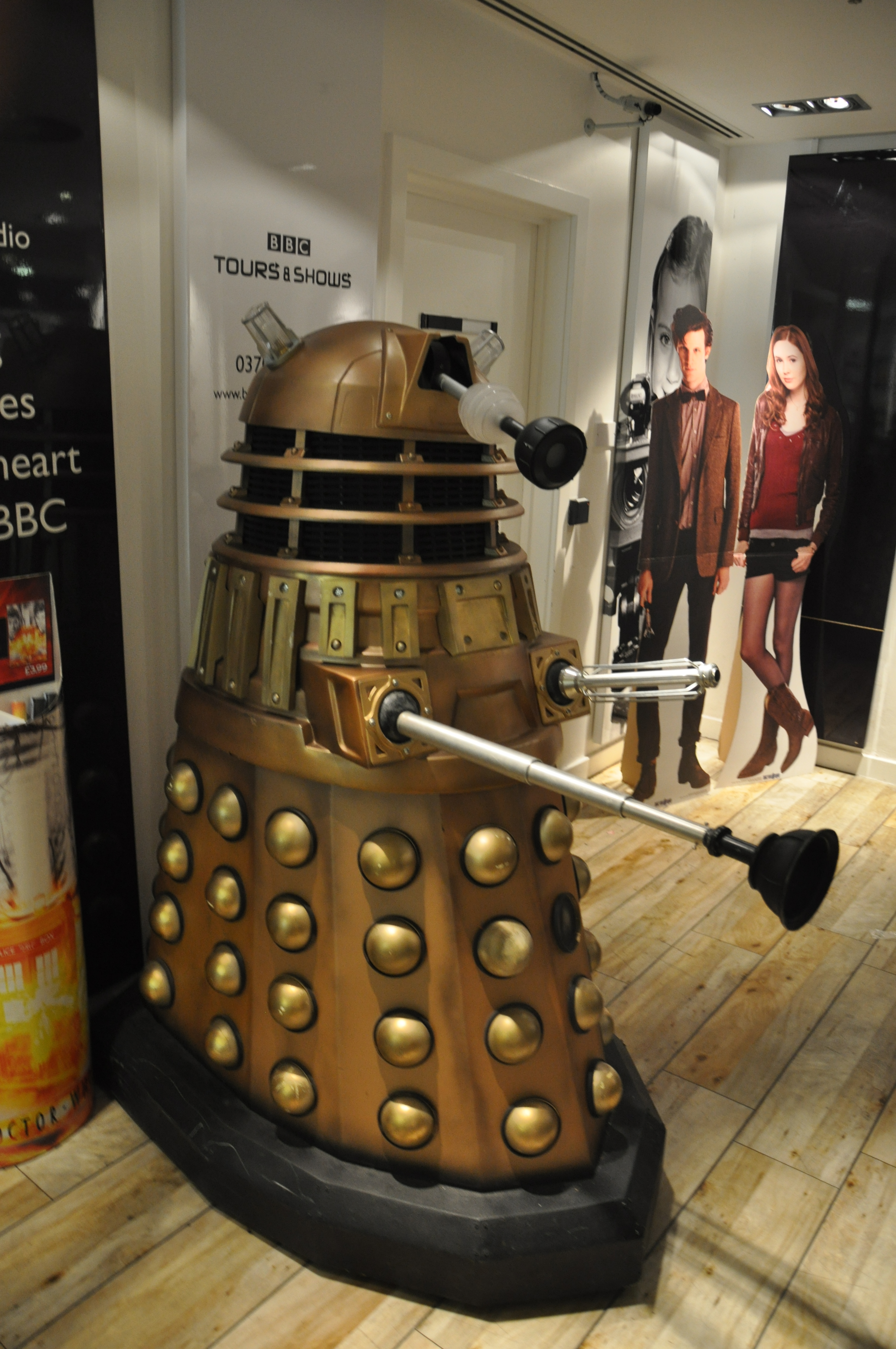 Ein Dr. Who Dalek im BBC Shop des Television Centers London.